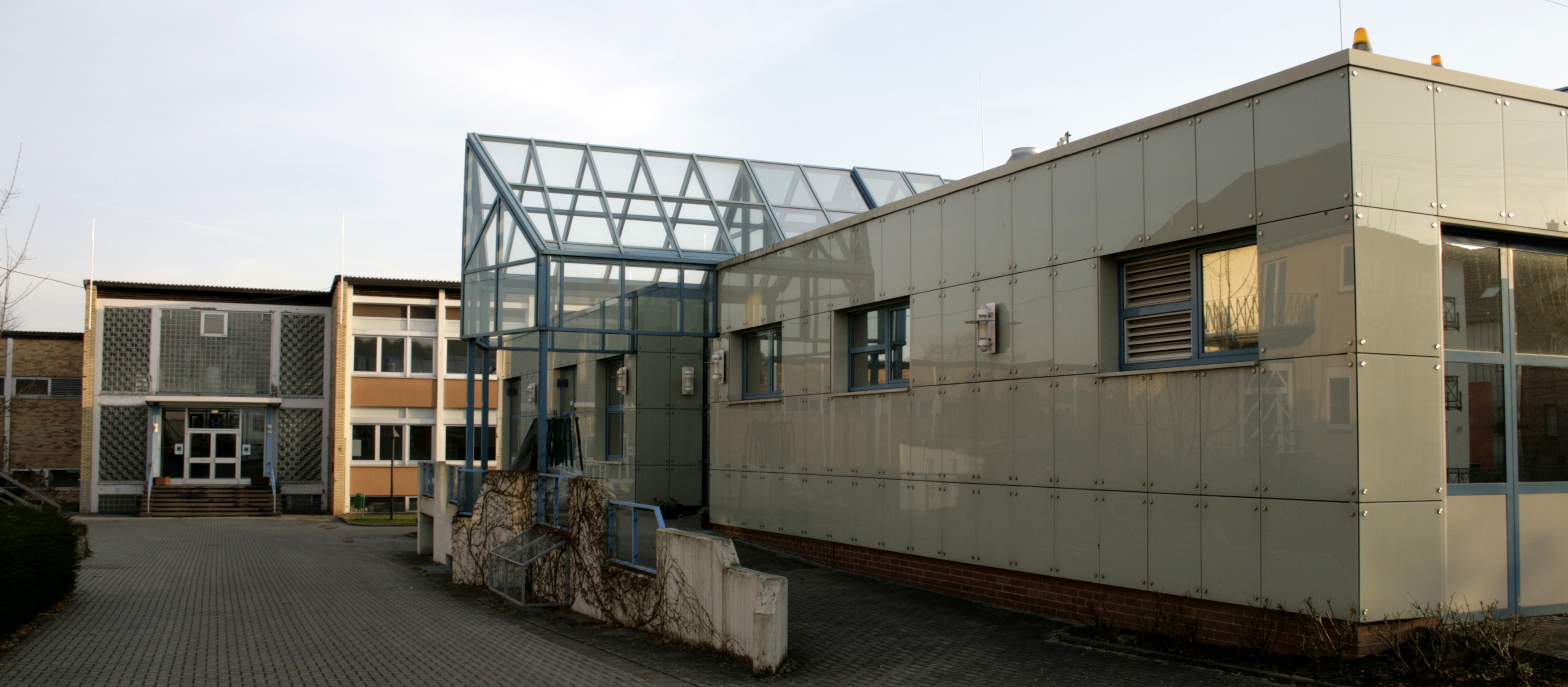 Glasfachschule in Niederhadamar, Deutschland